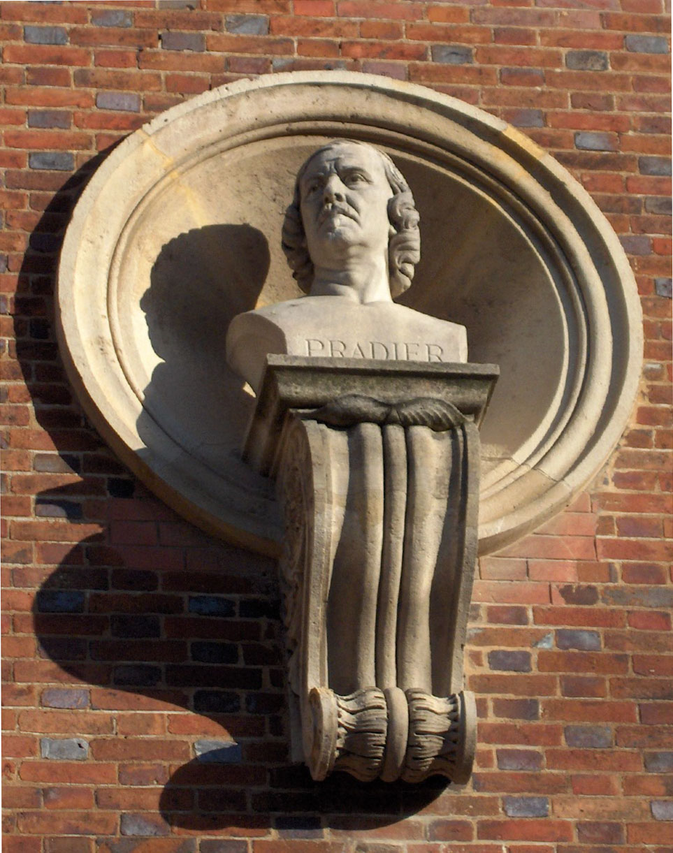 Buste du sculpteur James Pradier, par Eugène-Louis Lequesne, Paris, façade du musée du Luxembourg)